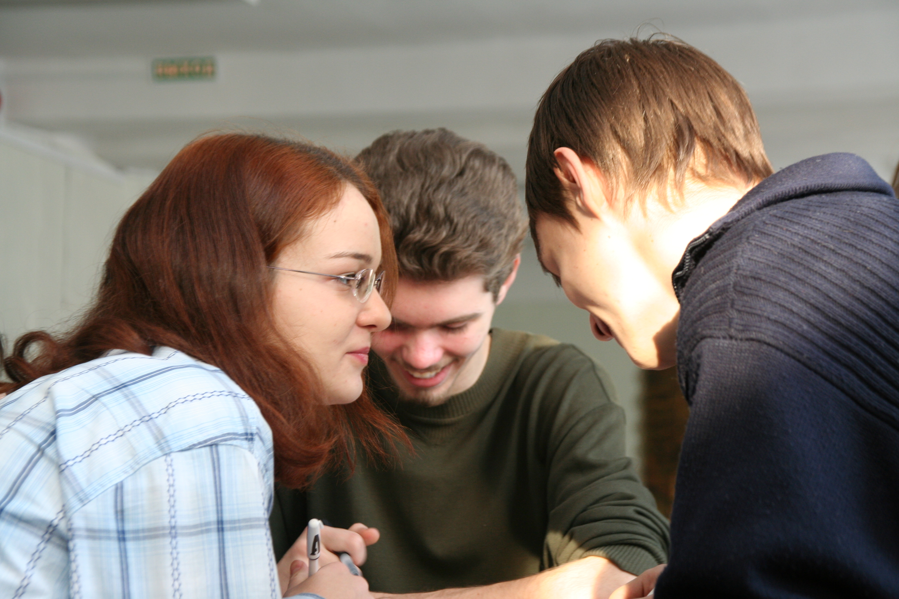 5 тур МКМ 2006-07